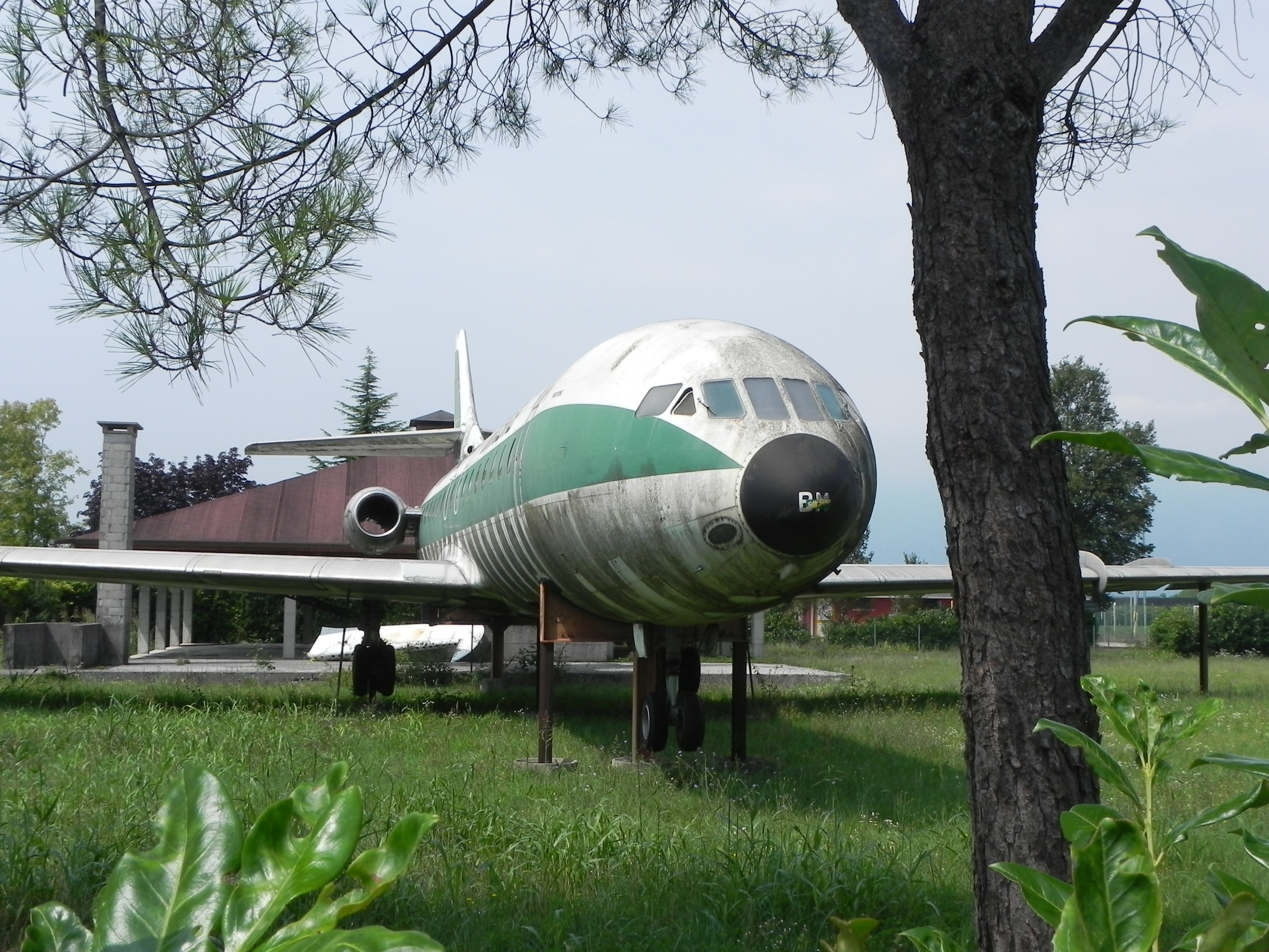 Ancienne Caravelle d'Alitalia, à proximité de Pordenone